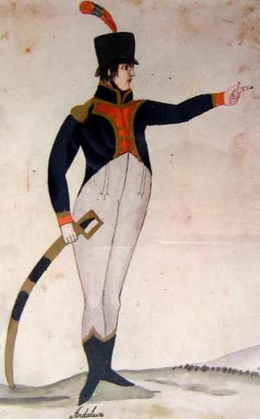 Uniforme de oficial del Tercio de Andaluces